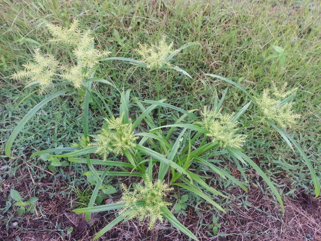 Cortadera (Cyperus luzulae), Puerto López, Meta, Los Llanos Colombia.